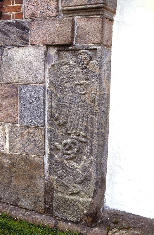 Tulstrup Kirke, Skanderborg Kommune - Nordportal, karmsten mod øst